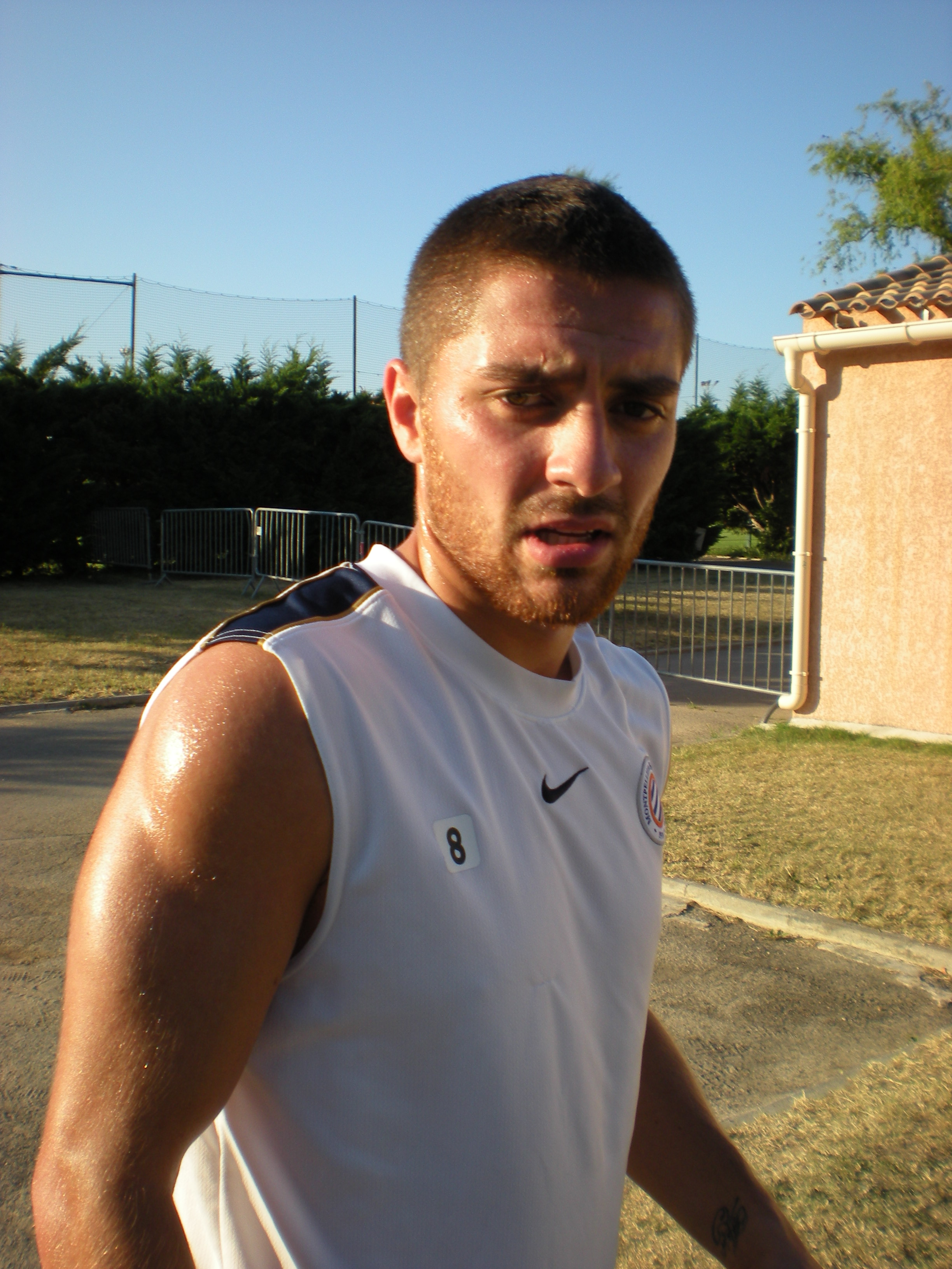 Anthony MOUNIER à l'entrainement.